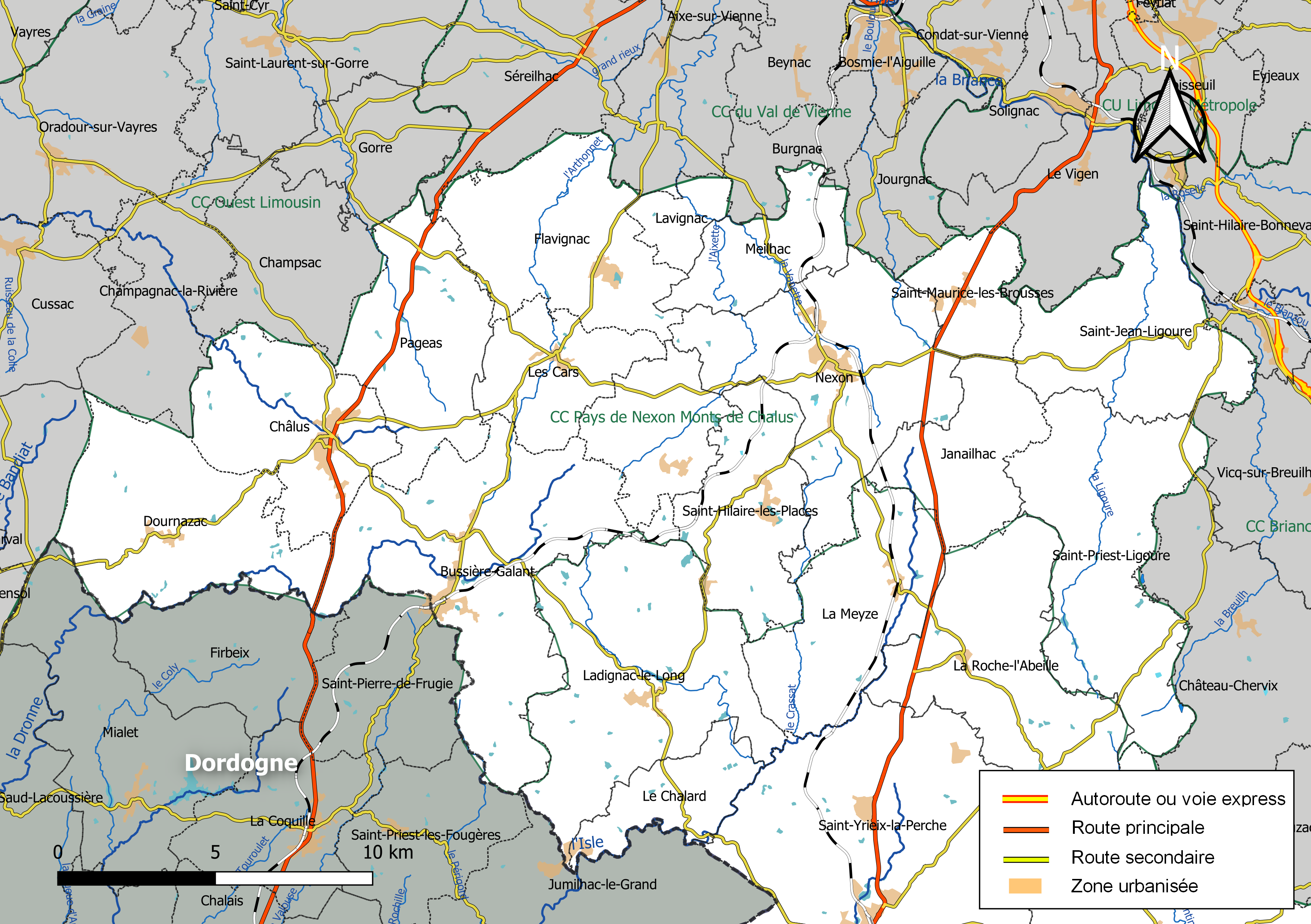 Carte géographique de la Communauté de communes Pays de Nexon Monts de Chalus, département de la Haute-Vienne, France. Composition au 1er janvier 2019.